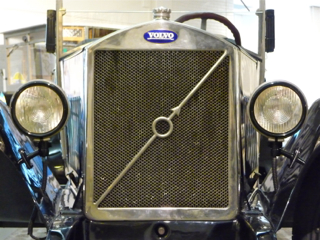 Front på Volvo från 1920-talet, bilen återfinns på Volvo Museum i Göteborg (2012)